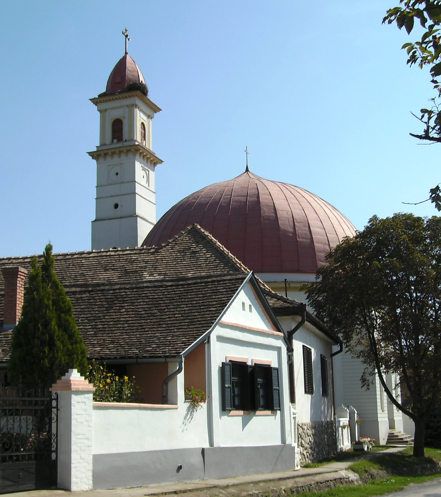 A palkonyai Szent Erzsébet-templom